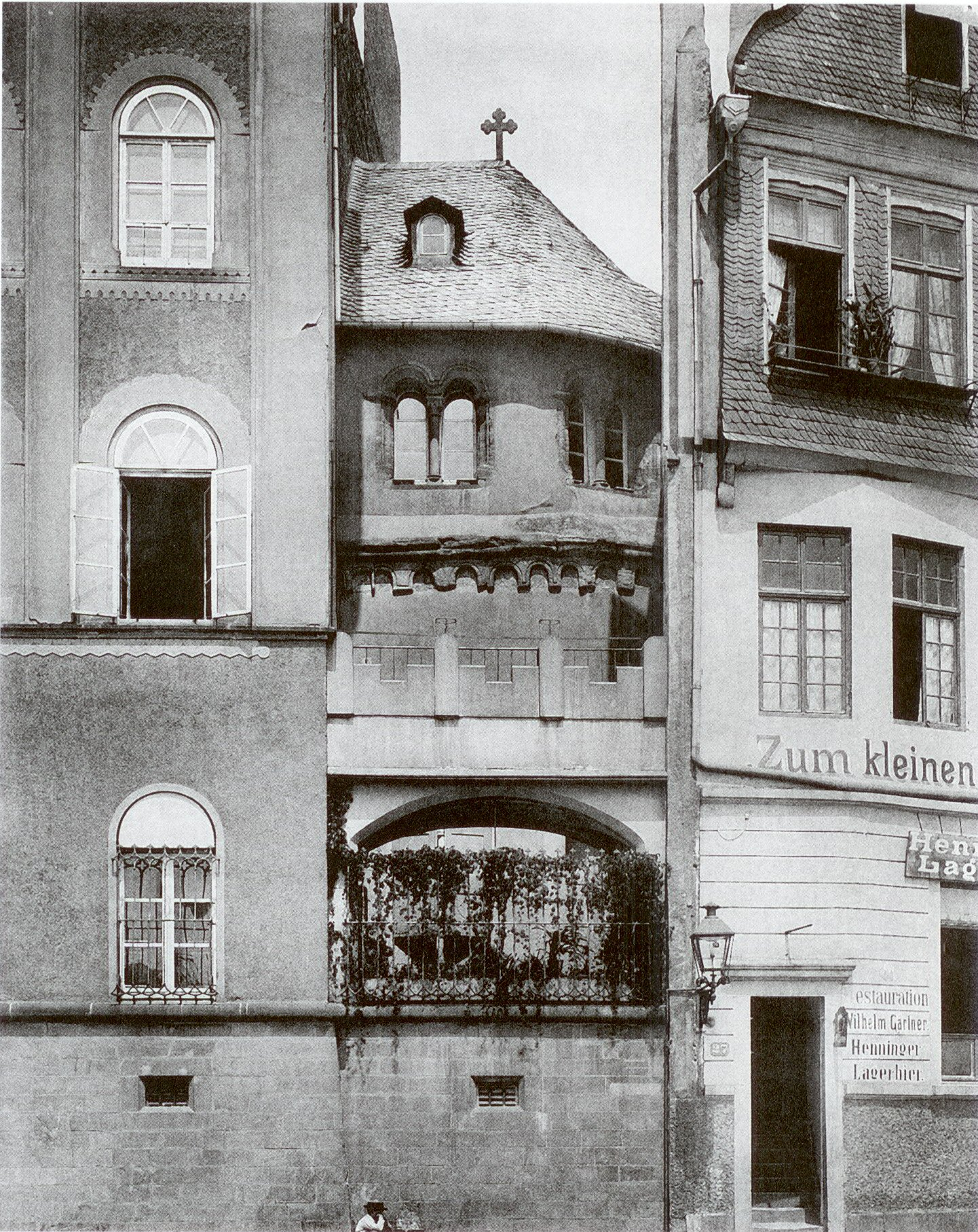 Frankfurt am Main, Germany. Die Saalhofkapelle um 1900, vom Mainkai aus gesehen